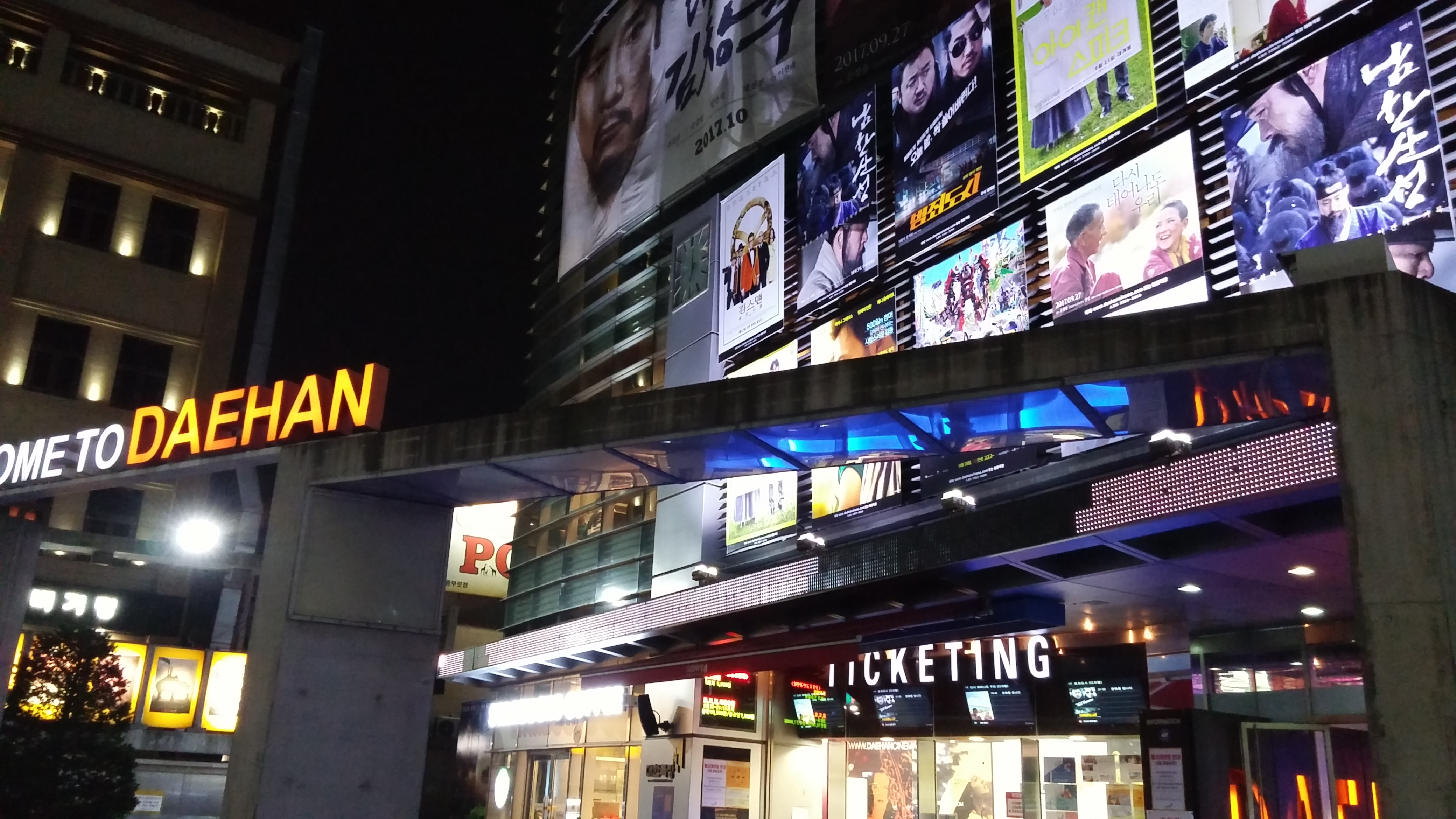 Der Eingang des Daehan Cinema in Chungmuro, Seoul.